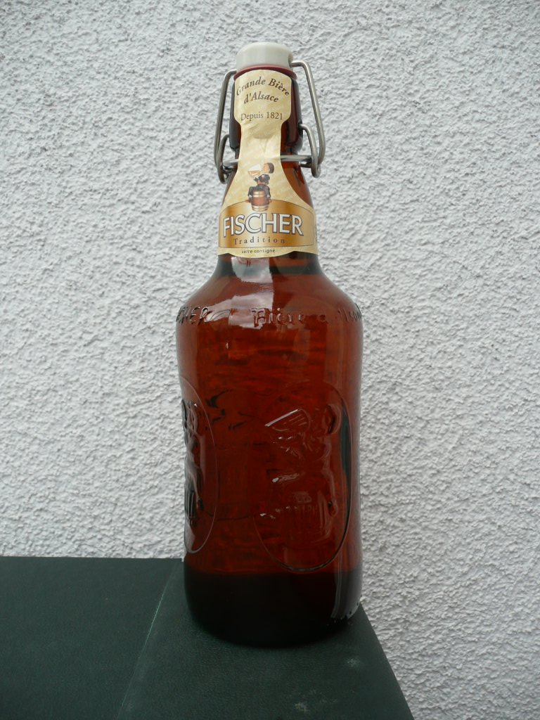 Sah interessant aus, schmeckt aber furchtbar. Ich kauf im Elsass nur noch Wein.